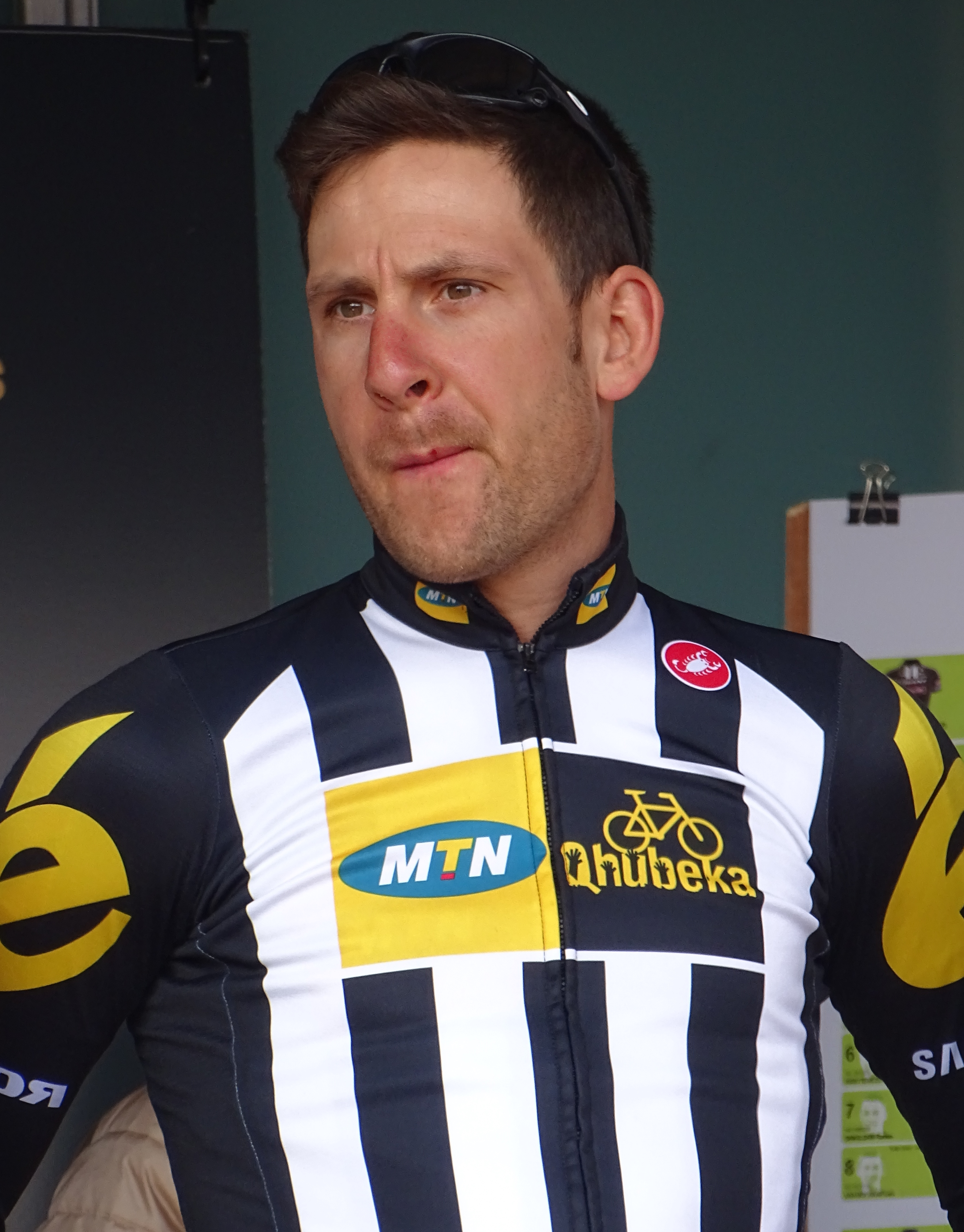 Reportage réalisé le mercredi 8 avril à l'occasion du départ du Grand Prix de l'Escaut 2015 à Anvers, Belgique.